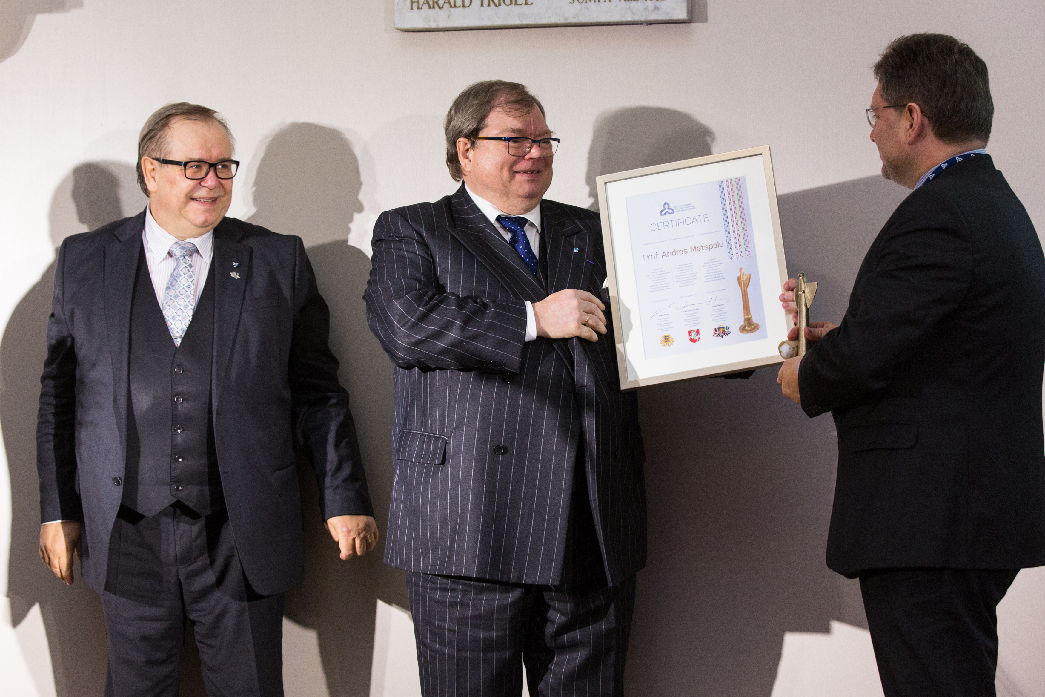 2017.gada 9.novembris. Baltijas Asamblejas balvu laureātu – Baltijas valstu zinātnieku, literātu un mākslinieku – apbalvošanas ceremonija Igaunijas galvaspilsētā Tallinā. Foto: Ernests Dinka, Saeimas Administrācija Izmantošanas noteikumi: saeima.lv/lv/autortiesibas